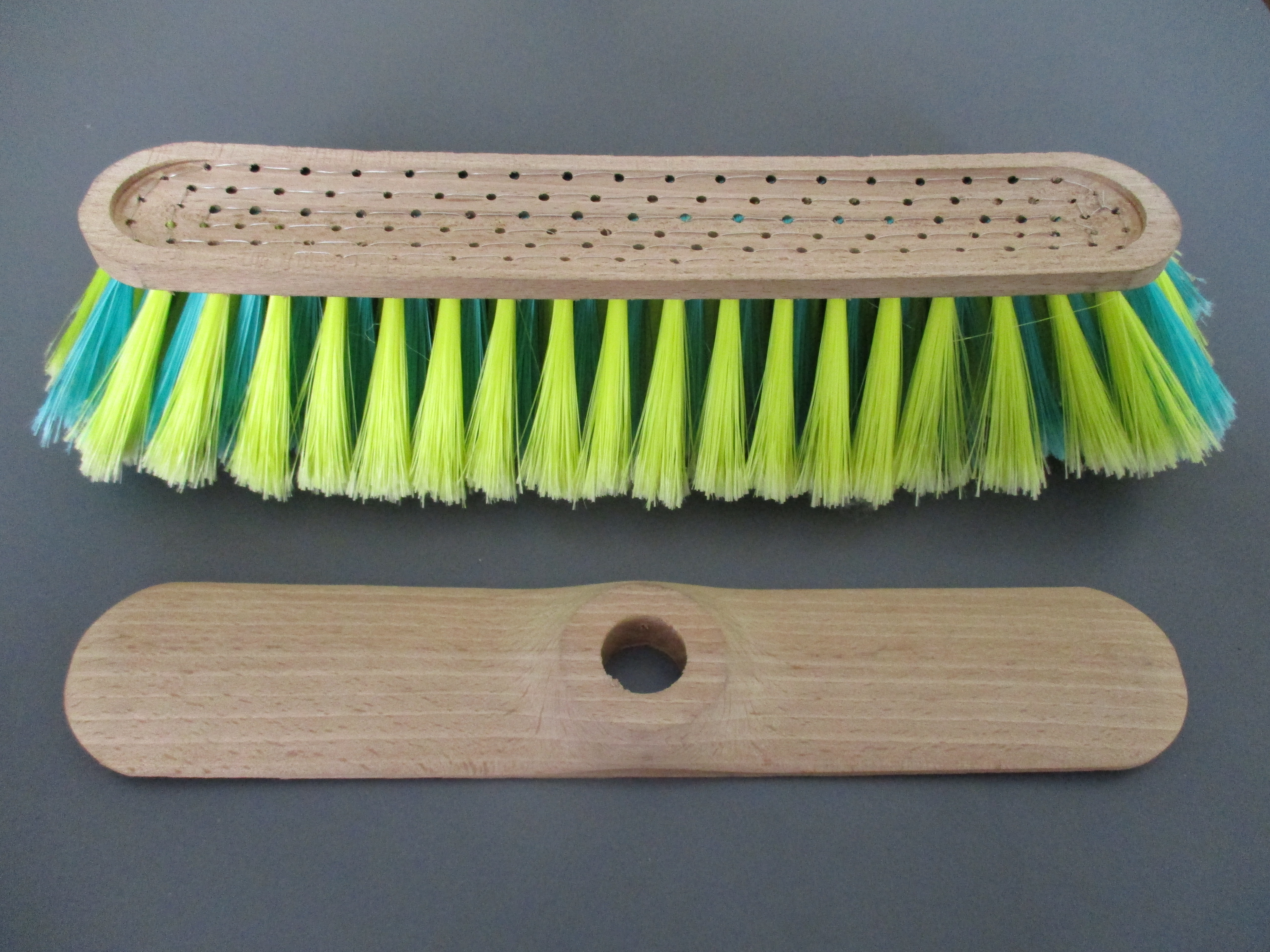 Tête de balai monté main au fil métallique et son couvercle à douille qui sera fixé sur la tête du balai